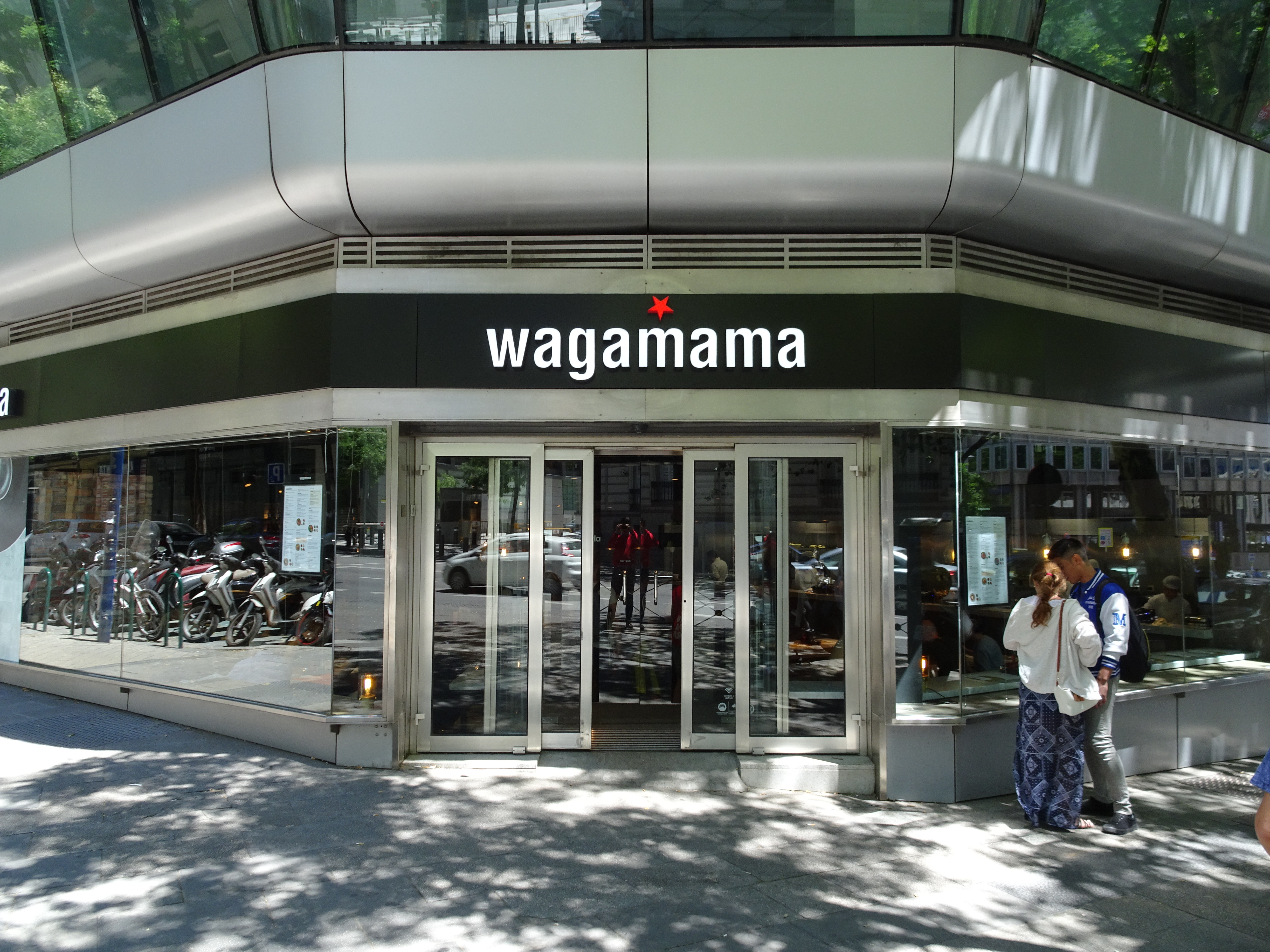 Wagamama en Génova 27, Madrid